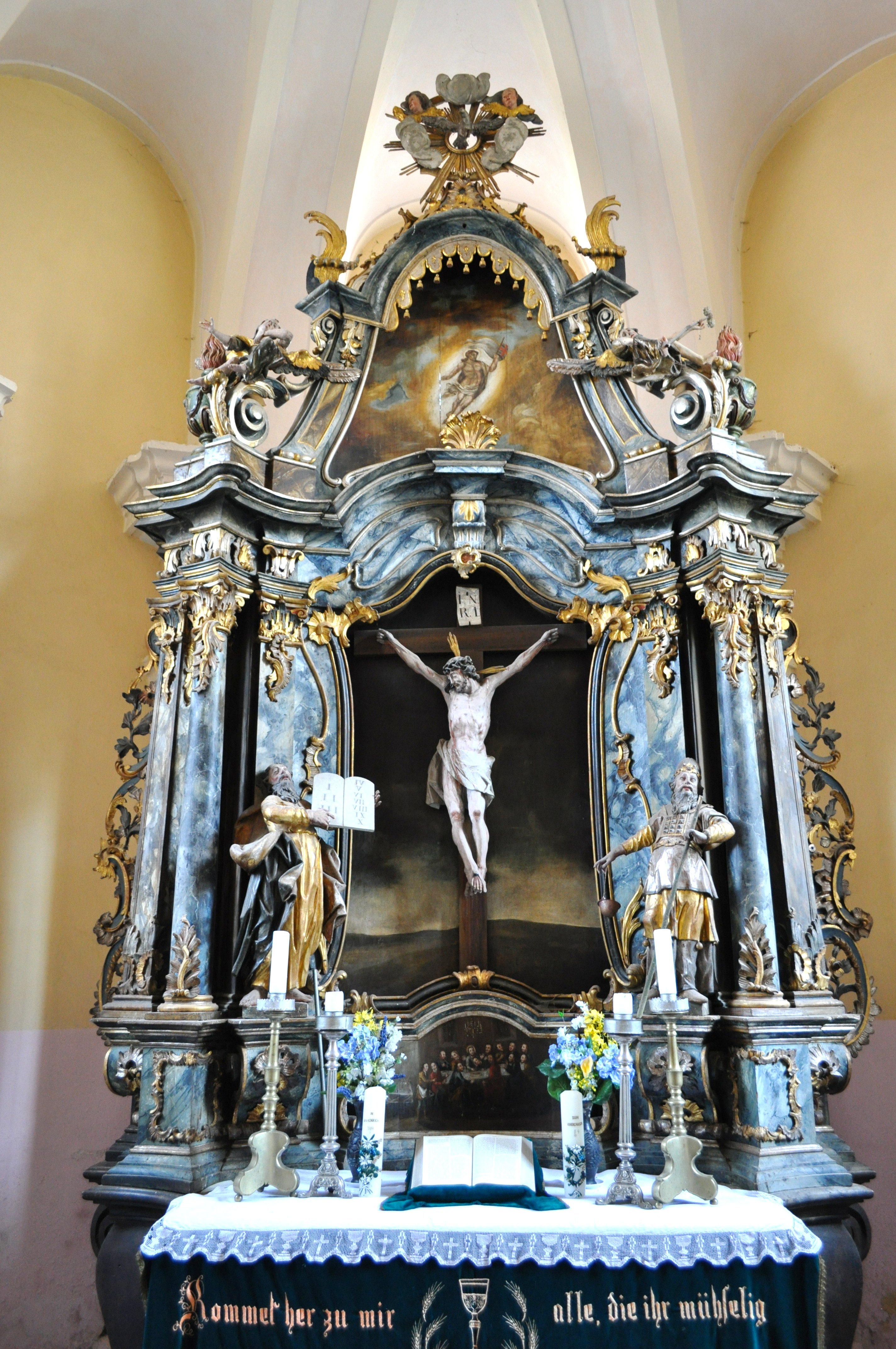 Biserica evanghelică, oraș Miercurea Sibiului, județul Sibiu 01